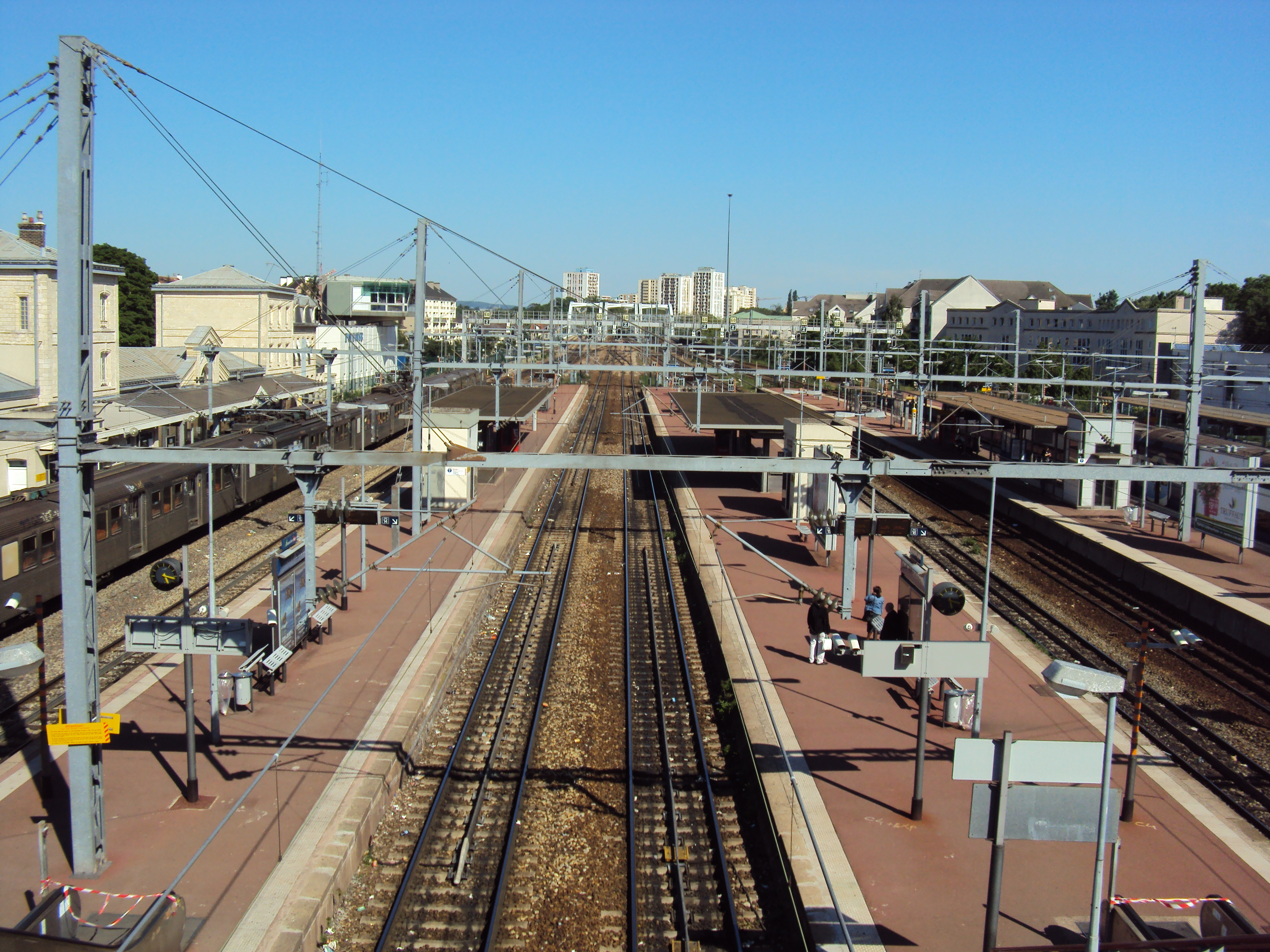 La gare de Pontoise et le Pont sur l'Oise